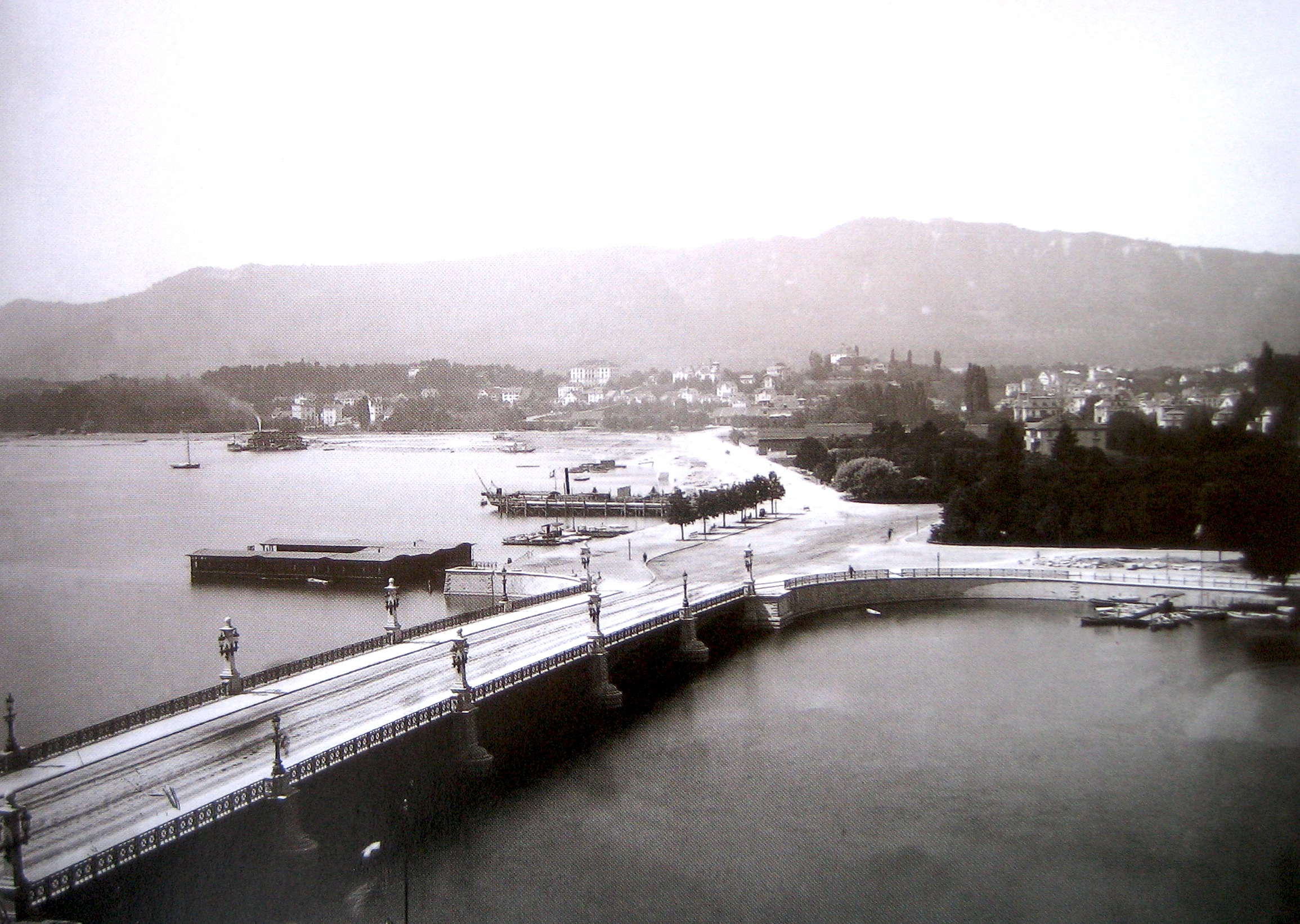 Die neue Quaibrücke in Zürich 1884 mit Männerbadeanstalt und Dampfschiffsteg. Hinten gehen die Auffüllarbeiten für das Alpenquai (General Guisan-Quai) voran. Antiquarische Gesellschaft Zürich